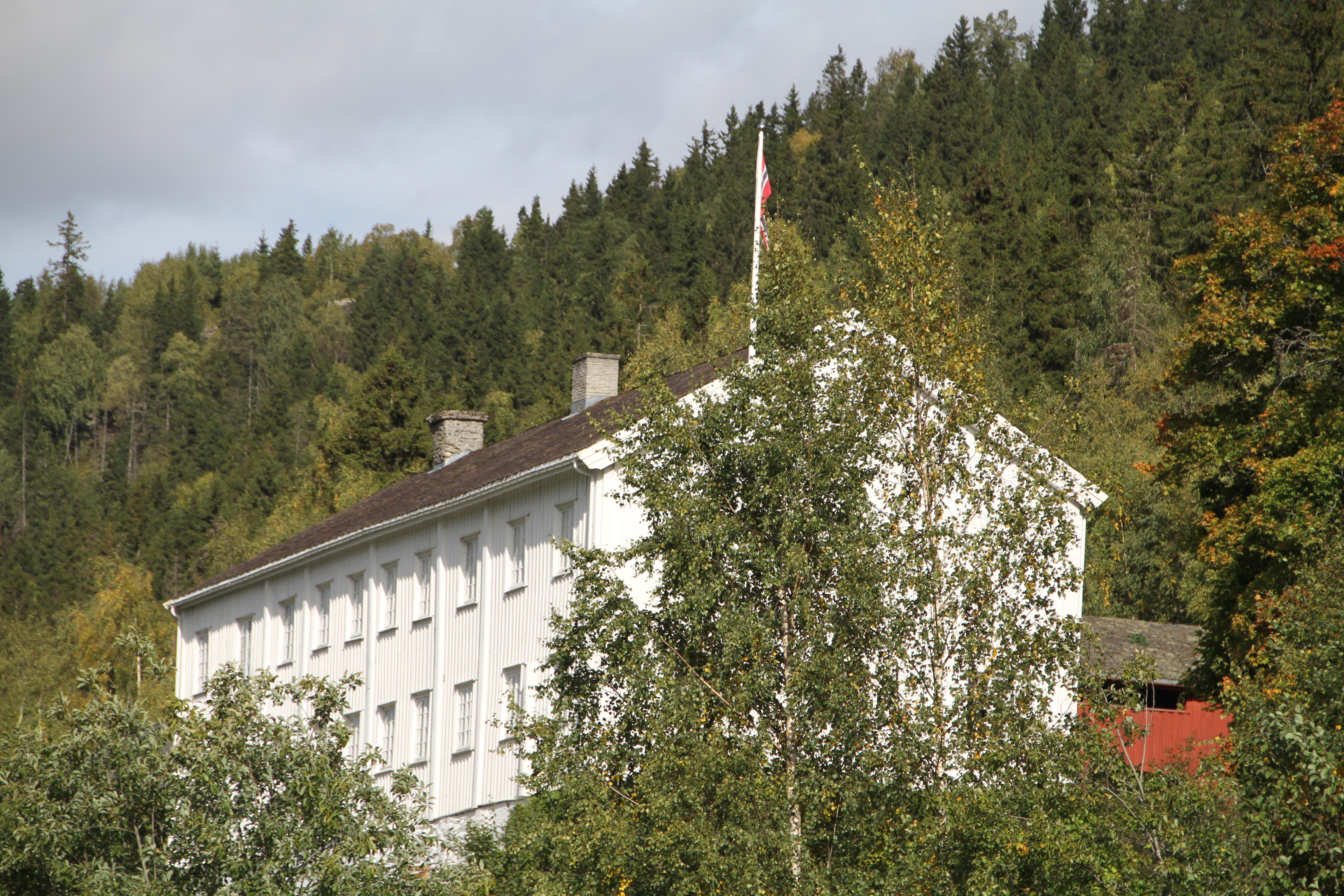 Ringebu parish manor, from the 17th century. Ringebu, Oppland, Norway.